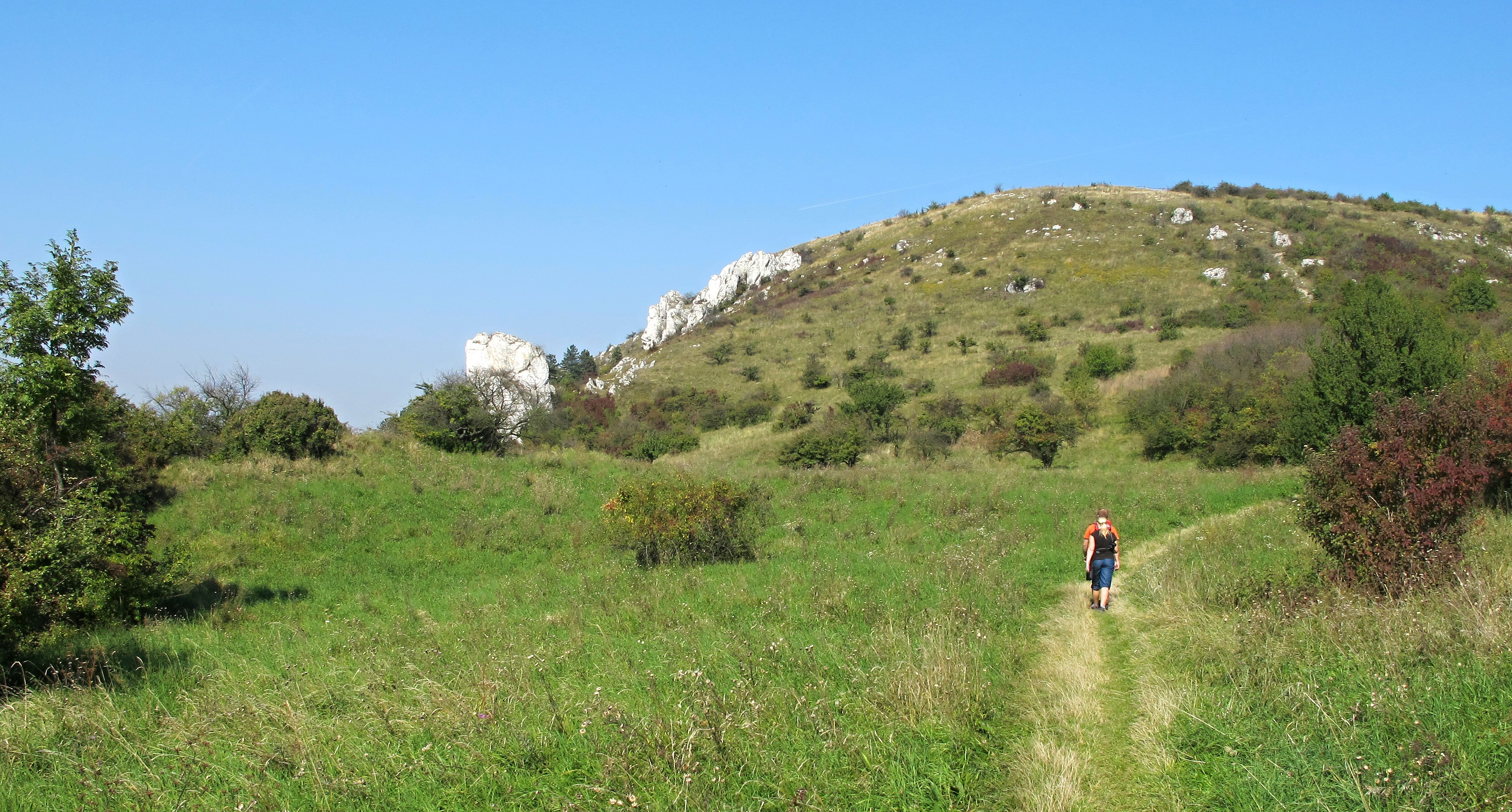 Cestou na Stolovou horu (NPR Tabulová, Růžový vrch a Kočičí kámen).